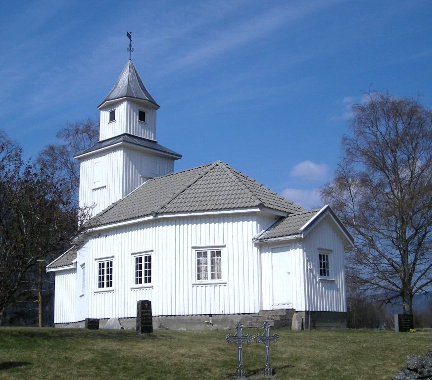 Sandnes kapell, Bygland